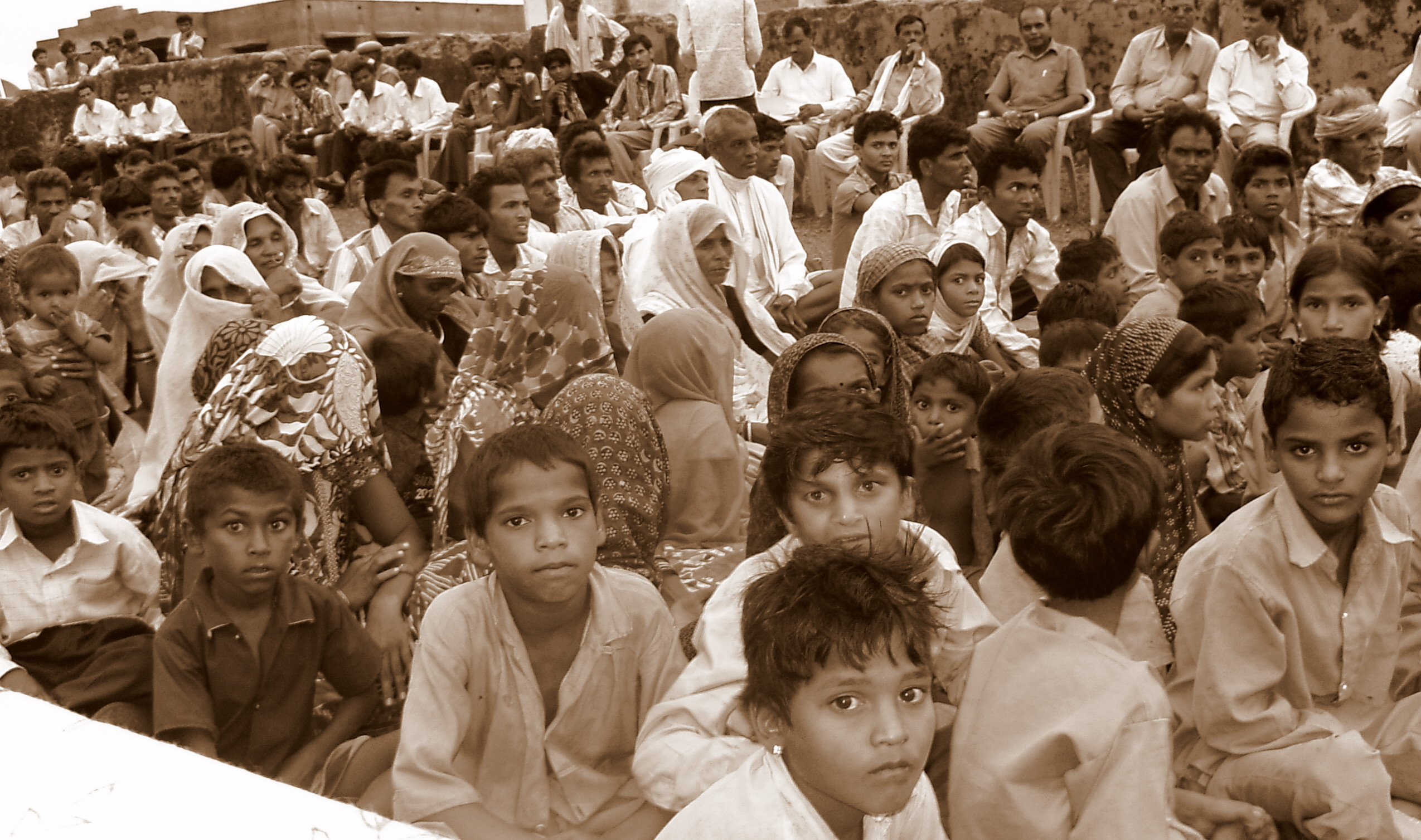 प्रतापगढ़ में एक सुदूर गांव रोहणिया के स्त्री-पुरुष और बच्चे